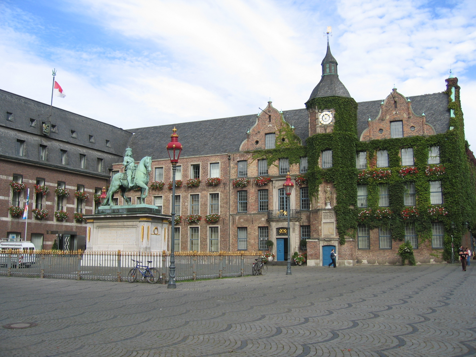 本图片由上传者User:Wkong拍摄于2005年9月27日。